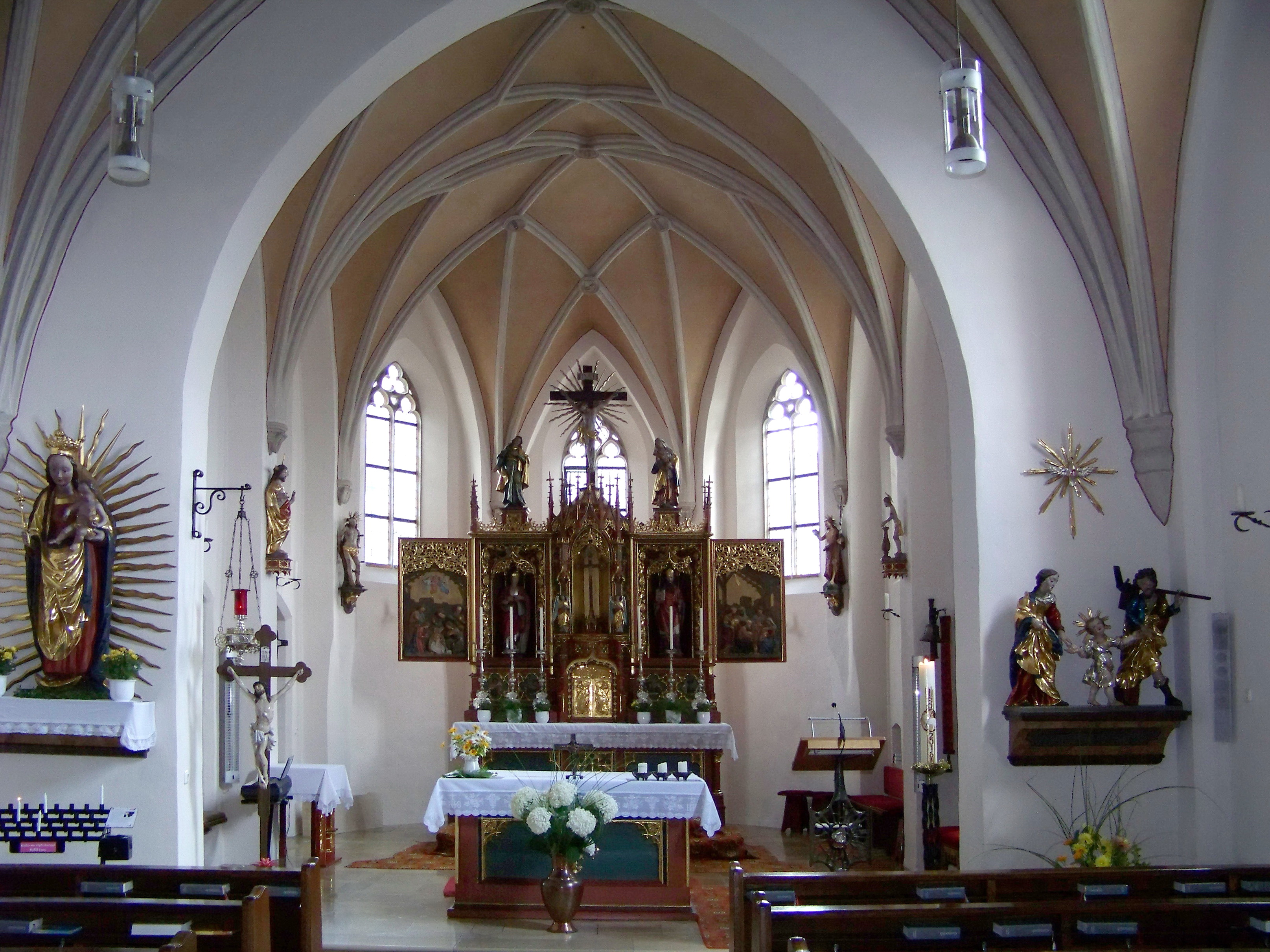 Kirchberg (Kröning) Pfarrer-Spirkner-Straße 5. Katholische Pfarrkirche St. Florian und St. Wolfgang. Saalbau mit eingezogenem Chor und angebauten Seitenschiffen, Anlage der zweiten Hälfte des 15. Jahrhunderts, mit freistehendem Sattelturm, spätromanisch, wohl noch 12. Jahrhundert, südliches Seitenschiff später hinzugefügt, Gliederung am Chor durch Strebepfeiler und Dachfries; mit Ausstattung. Innenraum: Chor eingezogen mit zwei Jochen. Langhaus mir nördlichem Seitenschiff zu drei Jochen. Im Chor und Langhaus spätgotisches Netzgewölbe.